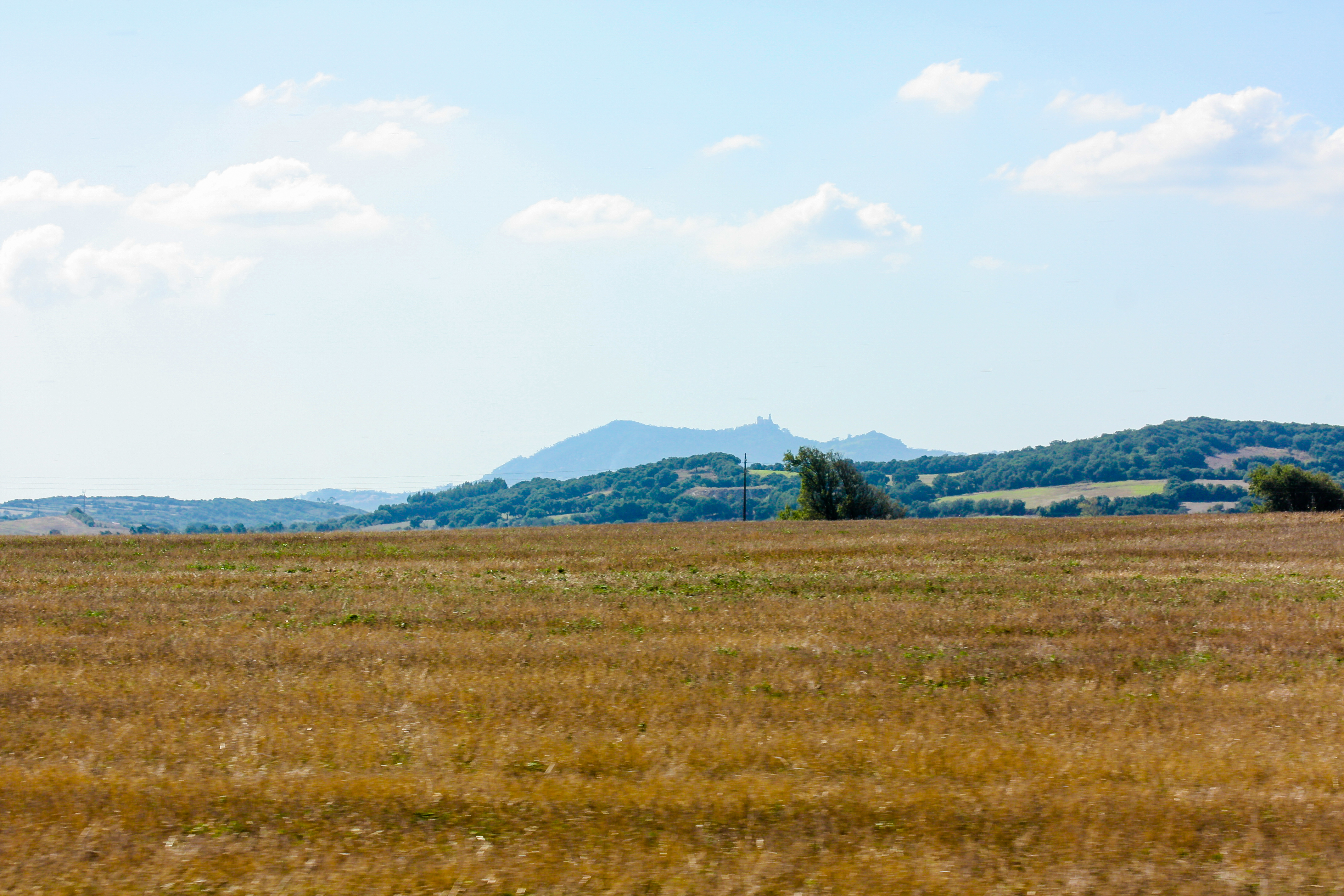 Aspeto da várzea de Alfouvar. Ao fundo, a serra de Sintra.